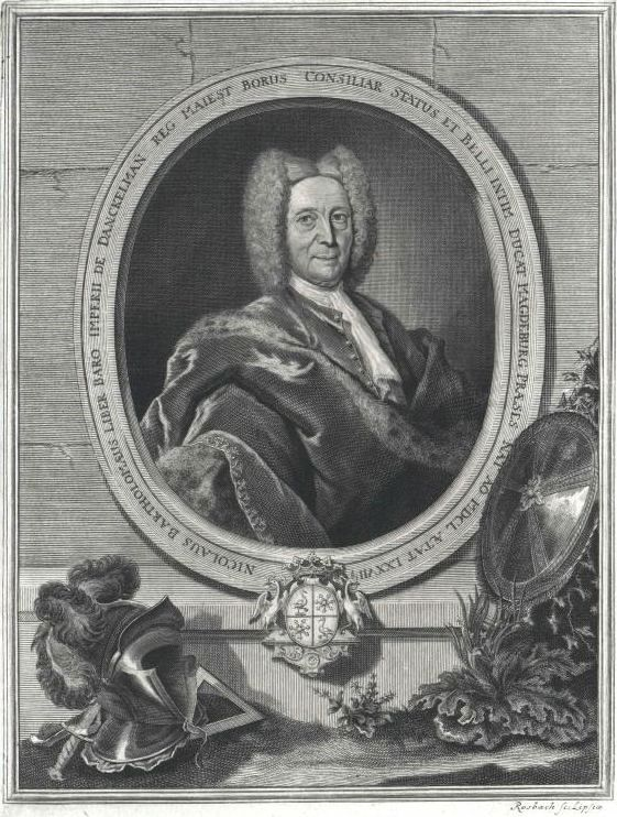 Nikolaus Bartholomäus von Danckelmann (1650-1739) (auch: Danckelmann) (Preußischer Staatsminister, Kammer- und Regierungspräsident in Magdeburg)